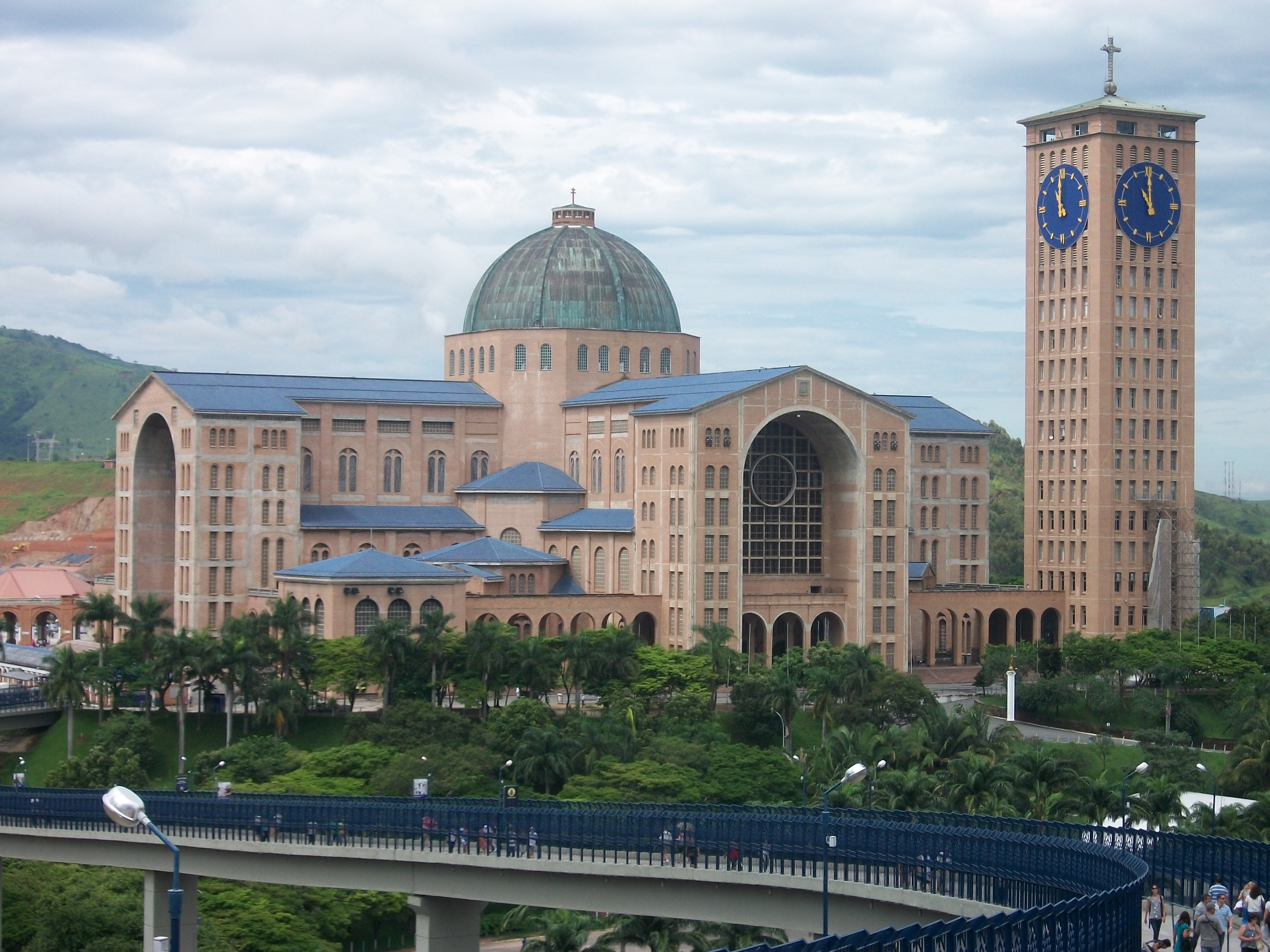 National Heiligtum von Aparecida, Brasilien; Januar von 2010.